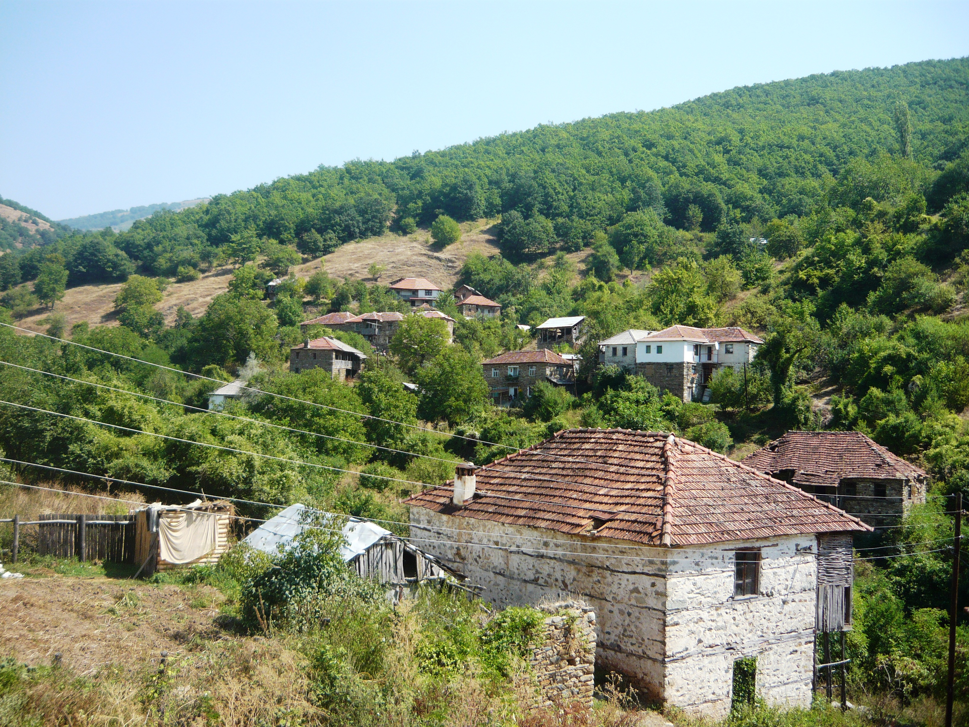 Долно Дивяци, Крушевско, Република Македония.